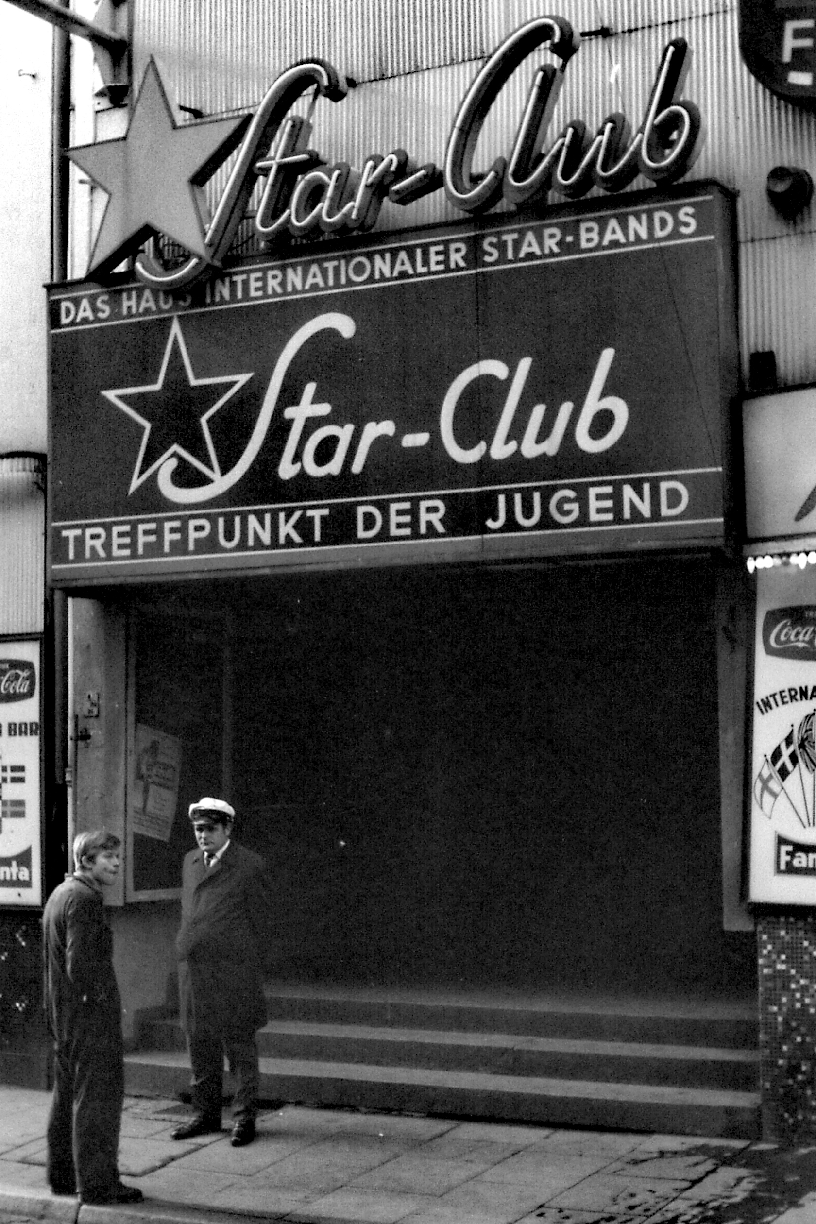 Eingang des Star-Clubs in der Großen Freiheit, Hamburg. Müsste 1968 gewesen sein, Scan vom Negativstreifen.